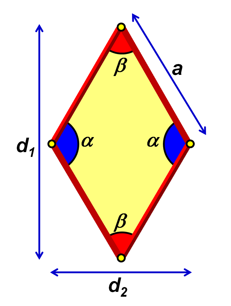 Maraldi